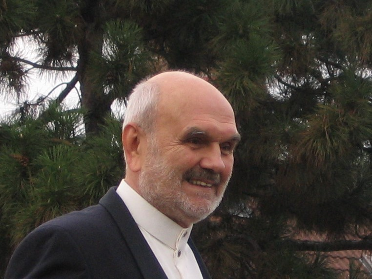 Josef vejvoda diriguje společné vystoupení orchestrů na festivalu Vejvodova Zbraslav 2017